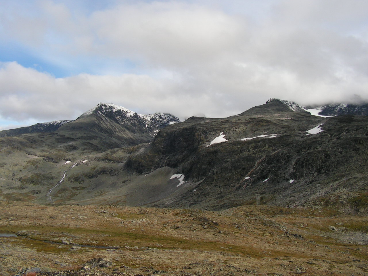 Hurrungane, links Soleibotntind (2083 m) im September 2004. Autor: Benutzer:Derhammer